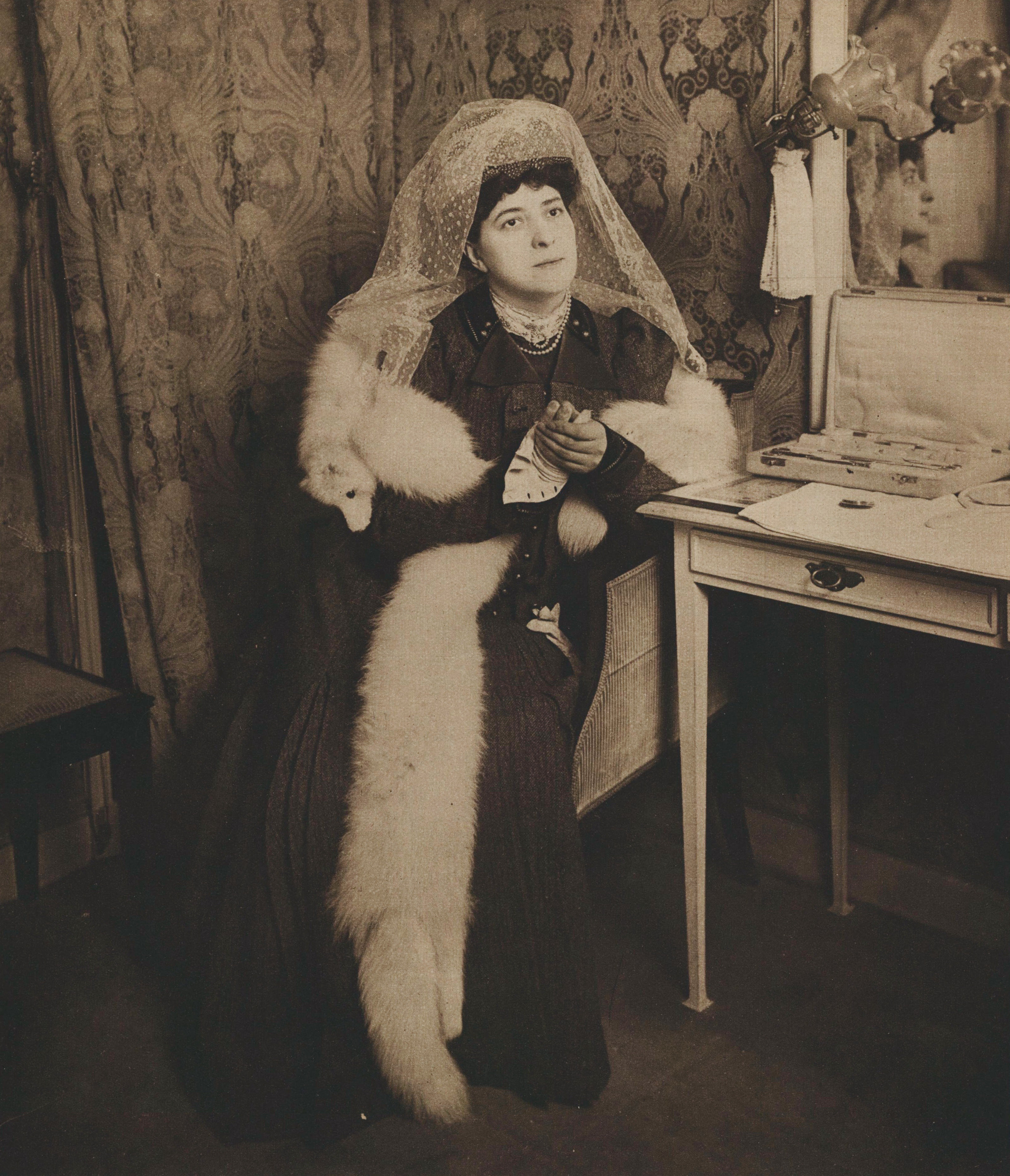 L'actrice française Caroline Eugénie Segond-Weber